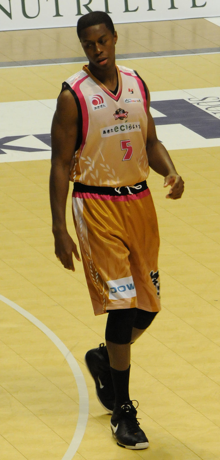 秋田ノーザンハピネッツ、ドクン・アキングバデ選手。秋田市立体育館で。